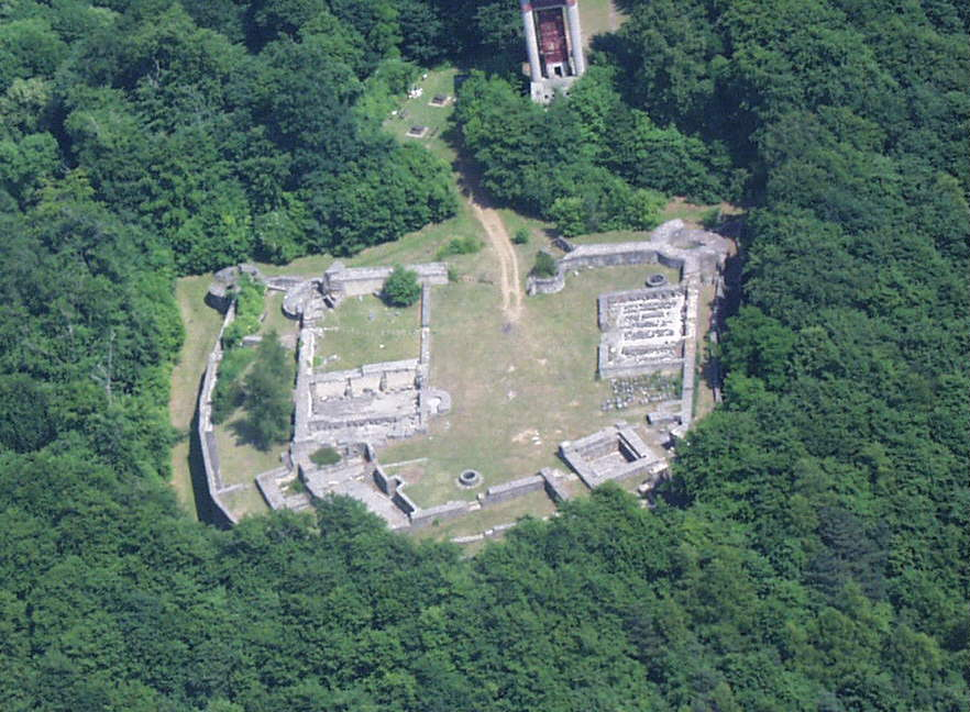 Buerg op dem Gehaansbierg